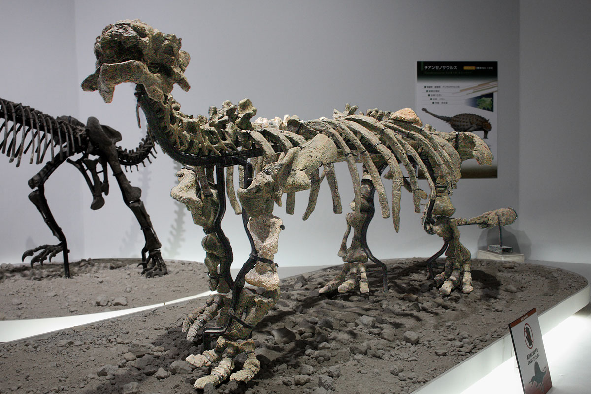 Tianzhenosaurus - 01